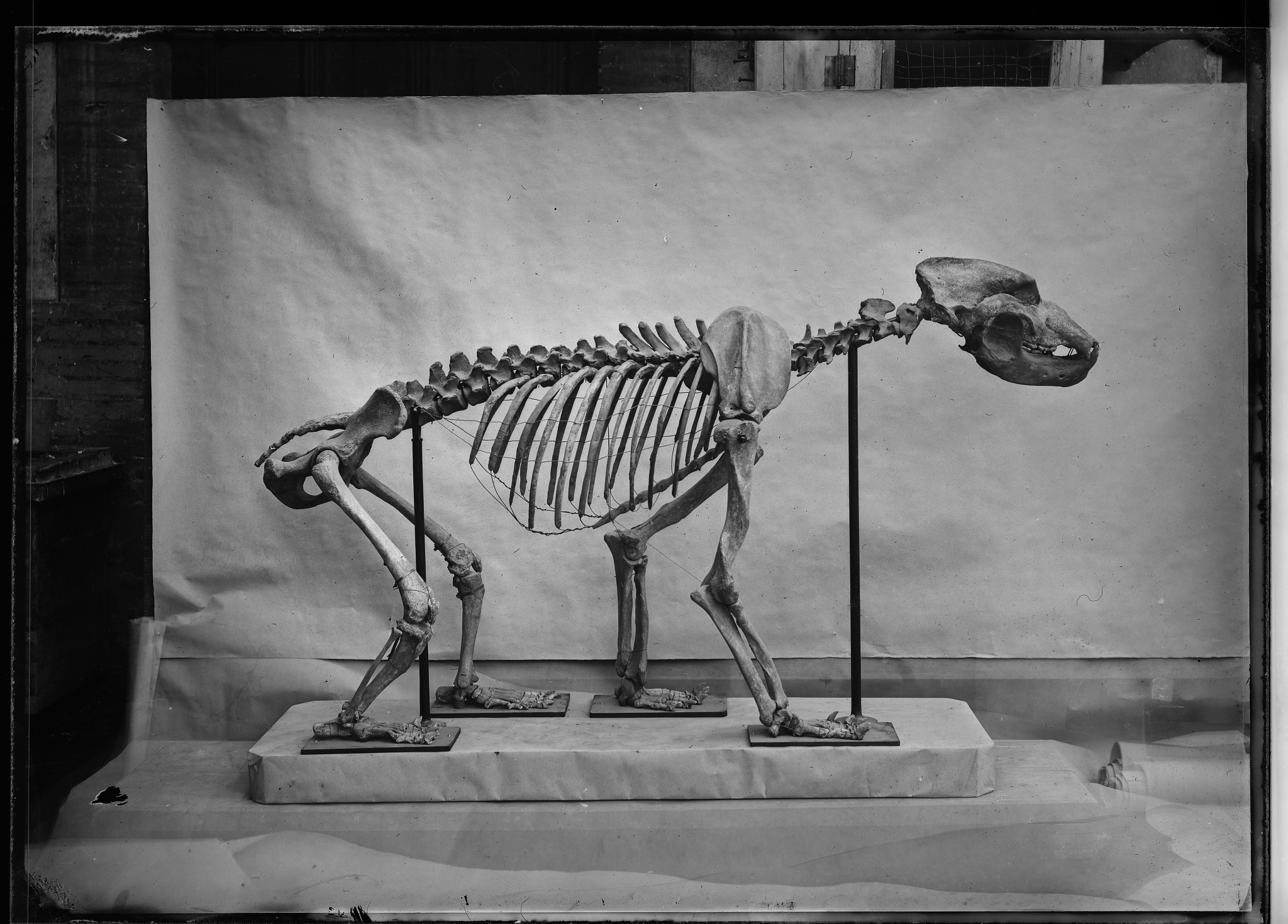 plaque négative au collodion format 13x18cm. inscription manuscrite par Eugène Trutat sur enveloppe : "Musée de Toulouse Squelette d'Ursus spelaeus"